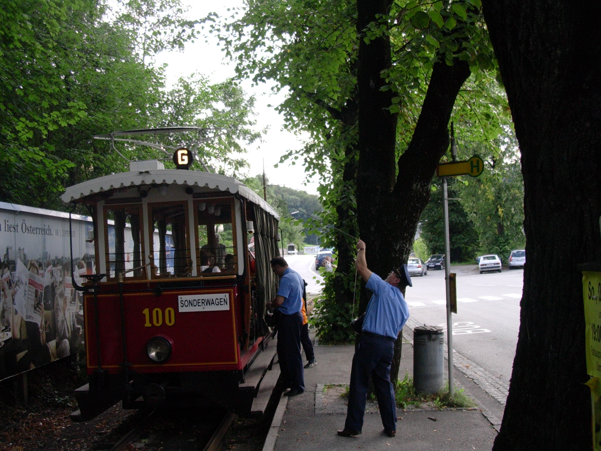 Wenden des Lyra-Stromabnehmers